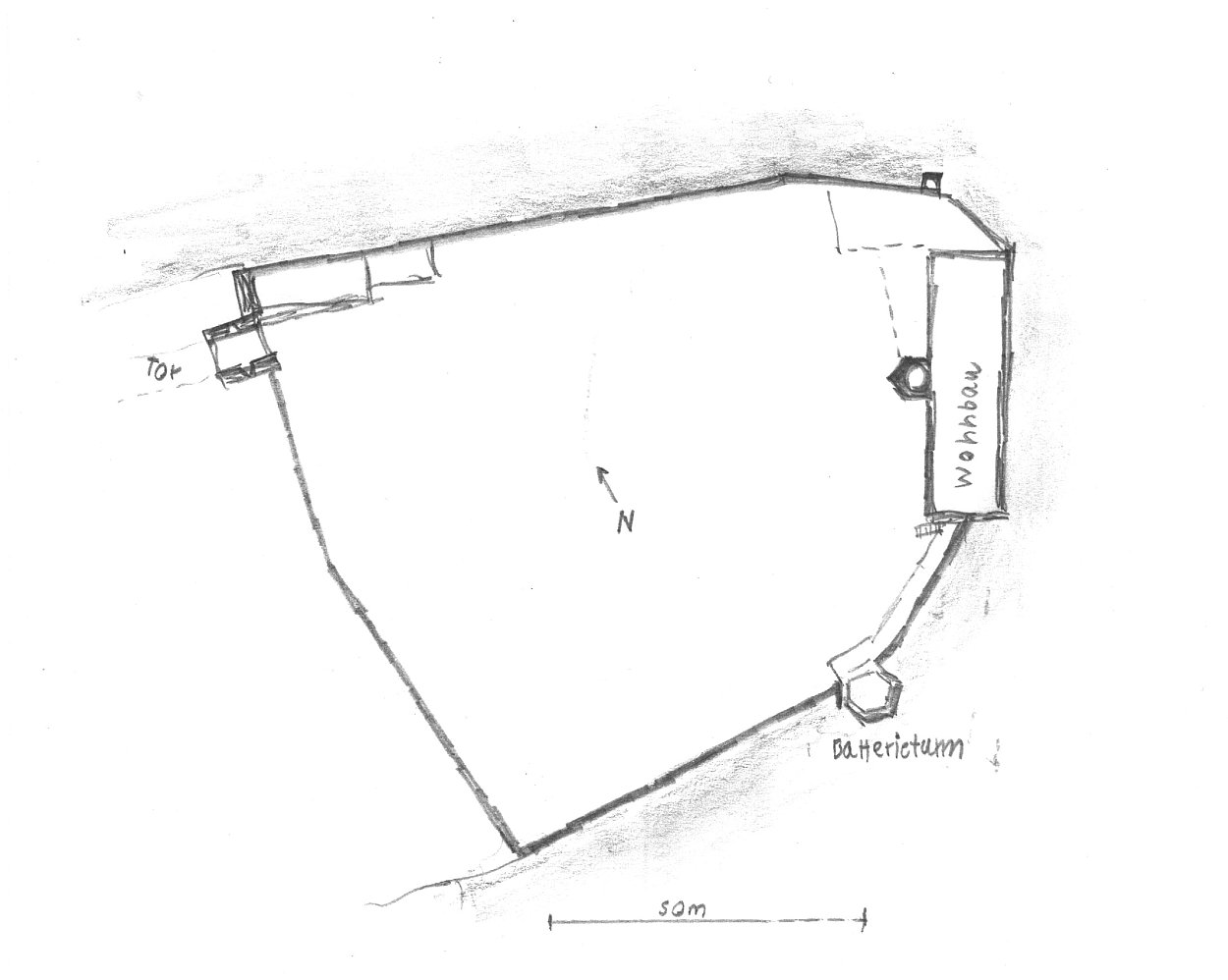 Burg Battenberg (Pfalz) Grundriss-Skizze (nach Kdm. Rheinland Pfalz)